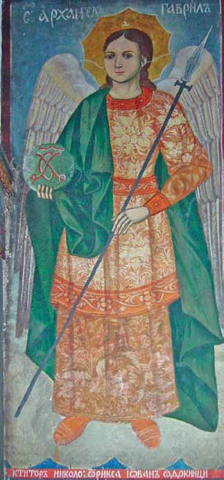 Архангел Гавриил, стенопис от „Архангел Михаил” в Копиловци, 1876